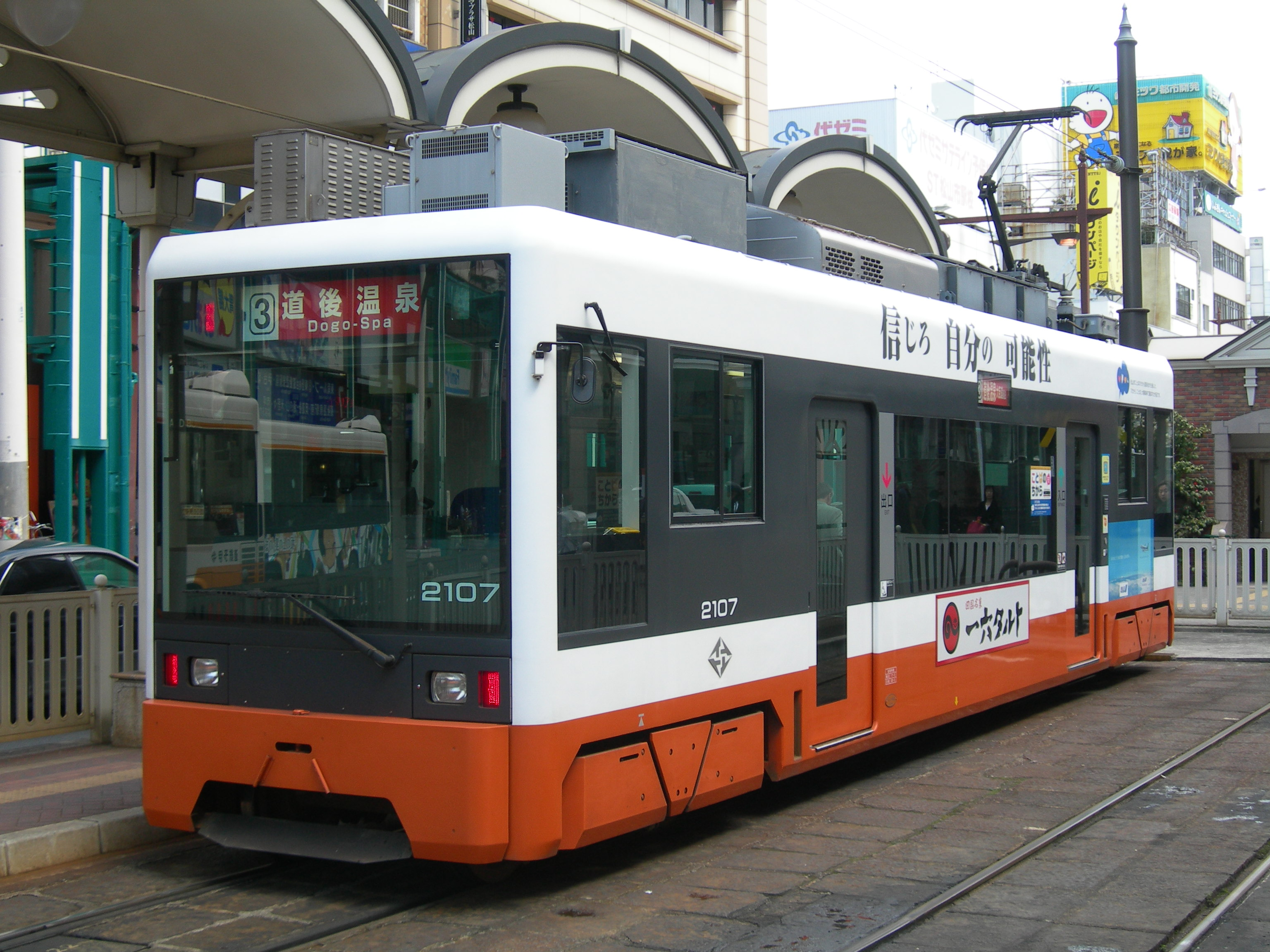 伊予鉄道モハ2100形電車